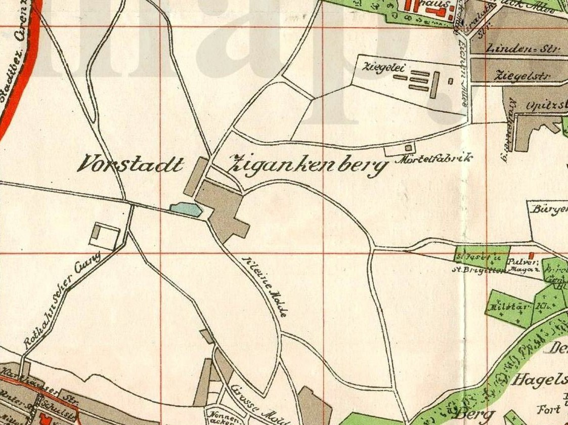 Gdańsk Suchanino.